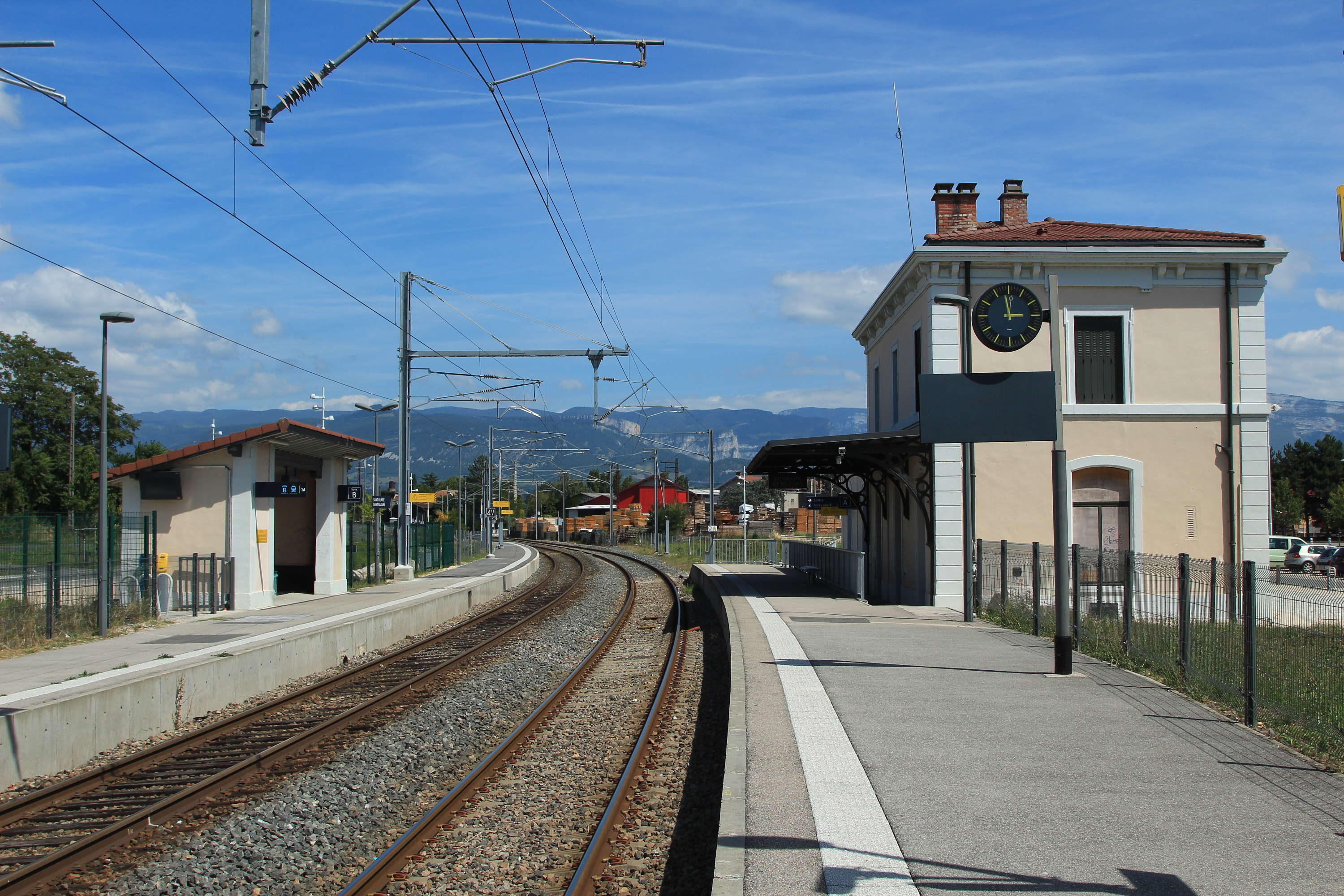 Vue générale des voies et quais de la gare de Saint-Hilaire - Saint-Nazaire, située sur la ligne Valence - Grenoble, dans l'Isère, en France.